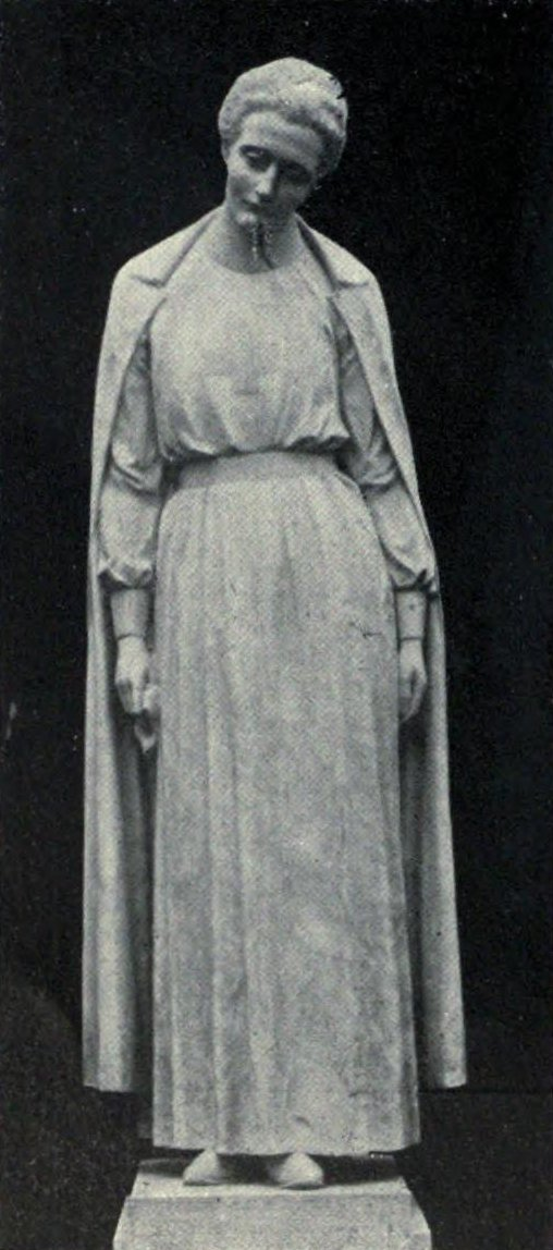 Miss Edith Cavell